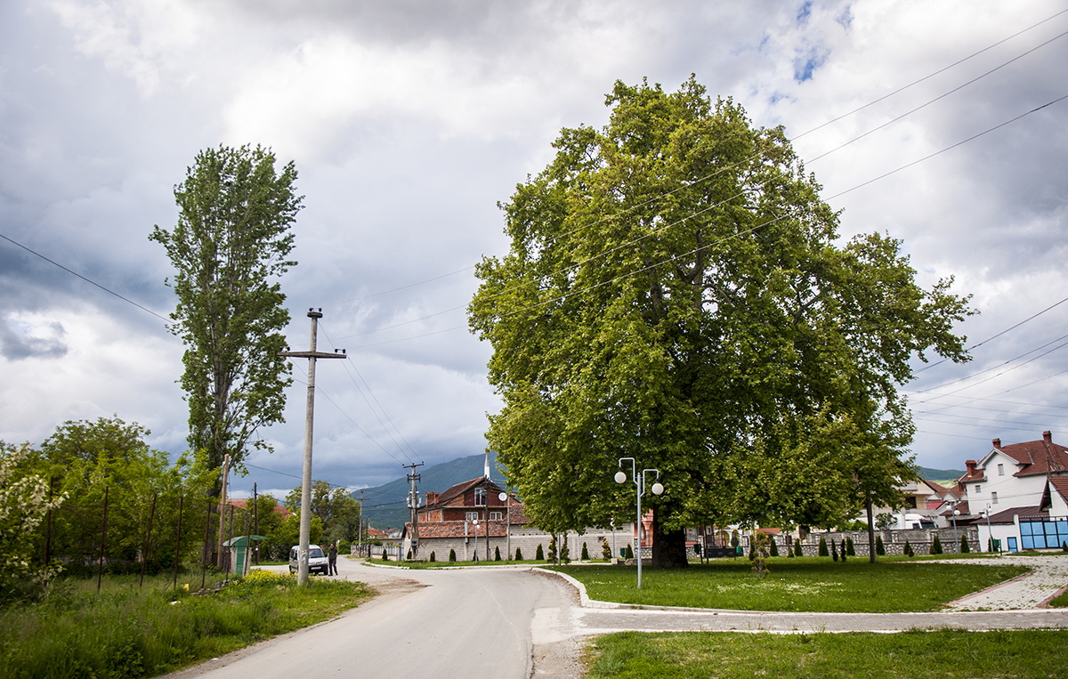 Ширината со големо дрво и чешмата во Биџево